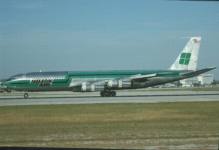 Boeing 707 de Millon Air que se estrello en Manta